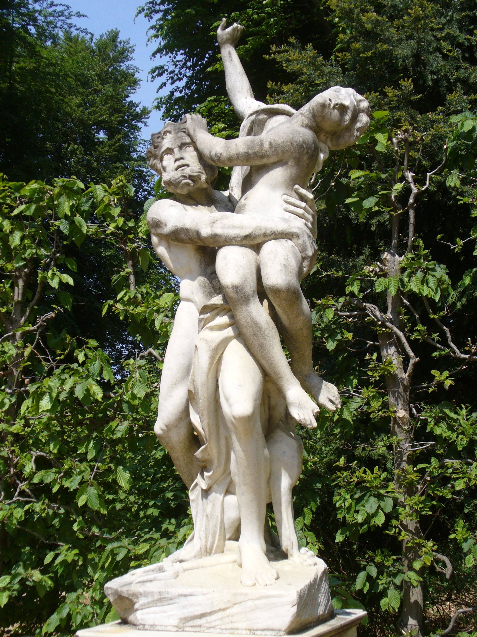 Pluto und Proserpina(Persephone)-Glocken Fontäne Rondell - Sanssouci